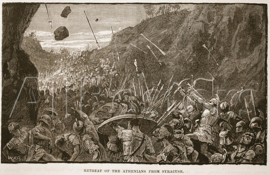 The same drawing entitled "Battle of Thermopylae".Disegno del XIX° sec. raffigurante l'esercito ateniese durante la sua ultima battaglia in Sicilia (IV° sec. a.C.)